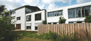 Friedrich Verlag, Velber, Außenansicht Verlagsgebäude